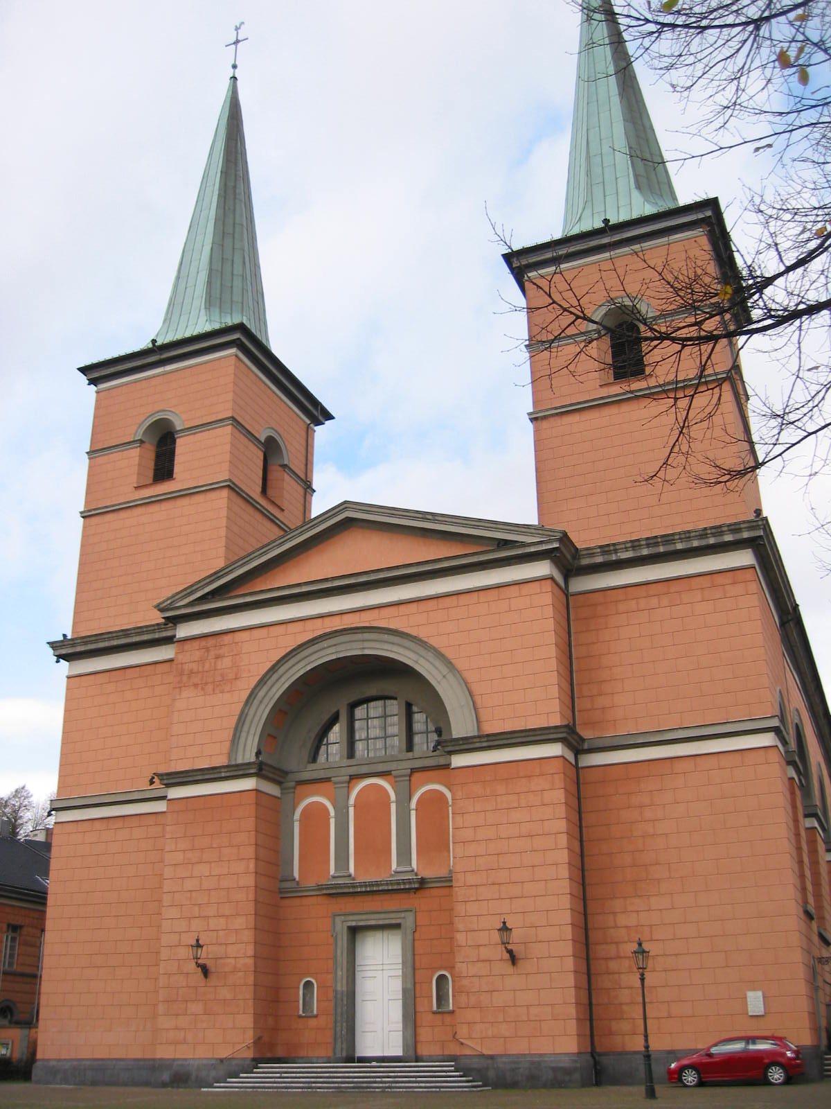 Wuppertal, St. Laurentiuskirche